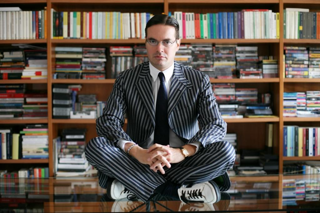 Klaus Davi